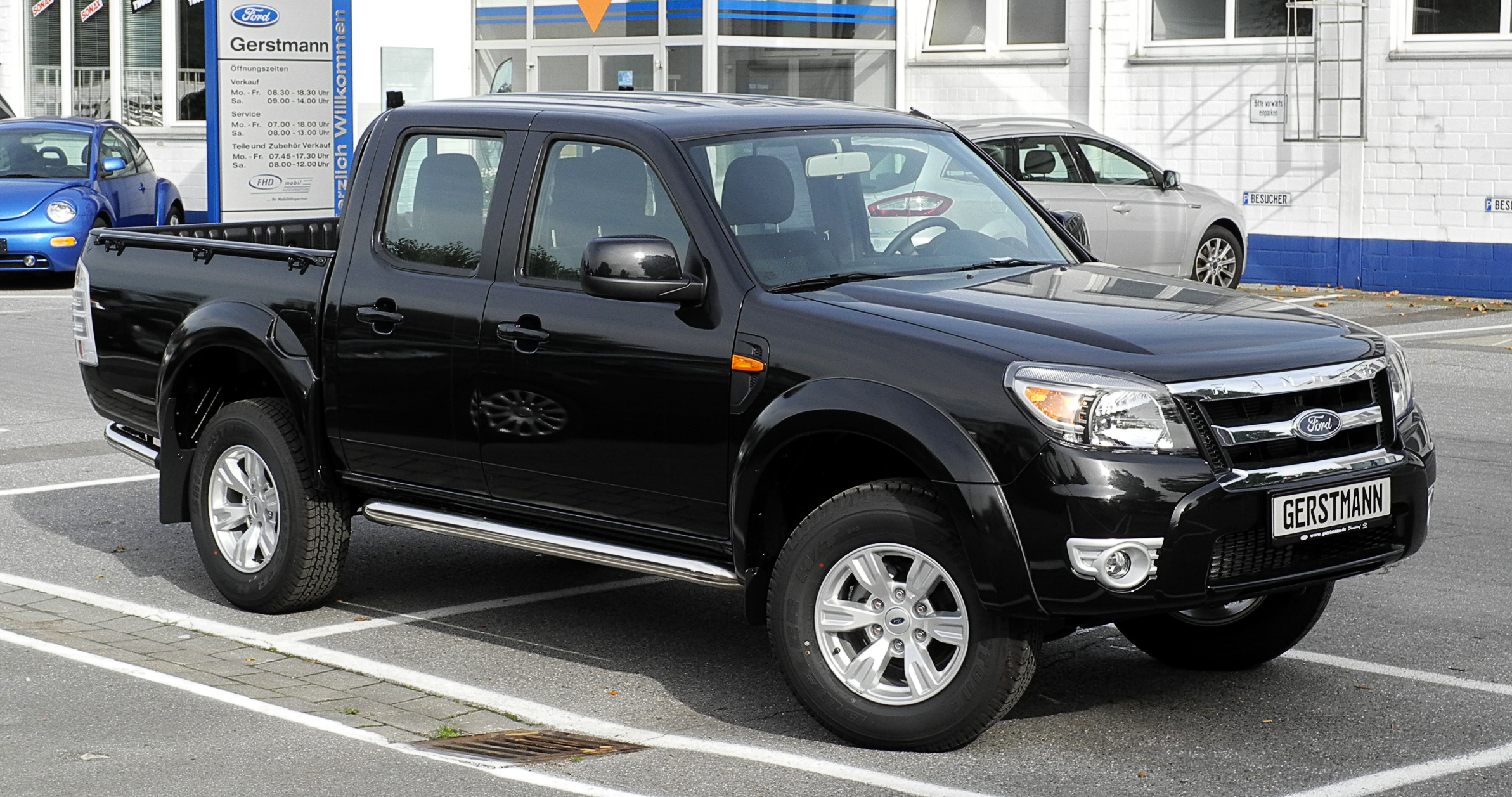 Ford Ranger XLT 2.5 TDCi Doppelkabine (II, Facelift)